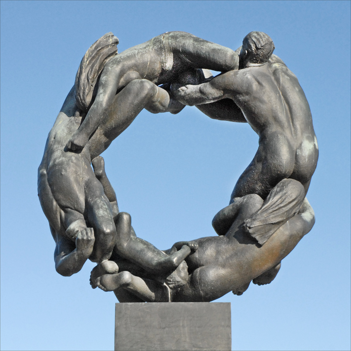 Cette oeuvre de Gustav Vigeland intitulée "la roue de la vie" domine le parc, elle est située au fond sur la partie la plus haute. Gustav Vigeland (Mandal, 11 avril 1869 - Kirkeveien, 12 mars 1943) est un sculpteur norvégien. Sa principale réalisation se trouve au Frognerpark, le plus grand parc d'Oslo, où sont exposées 214 de ses œuvres. extrait de Wikipedia